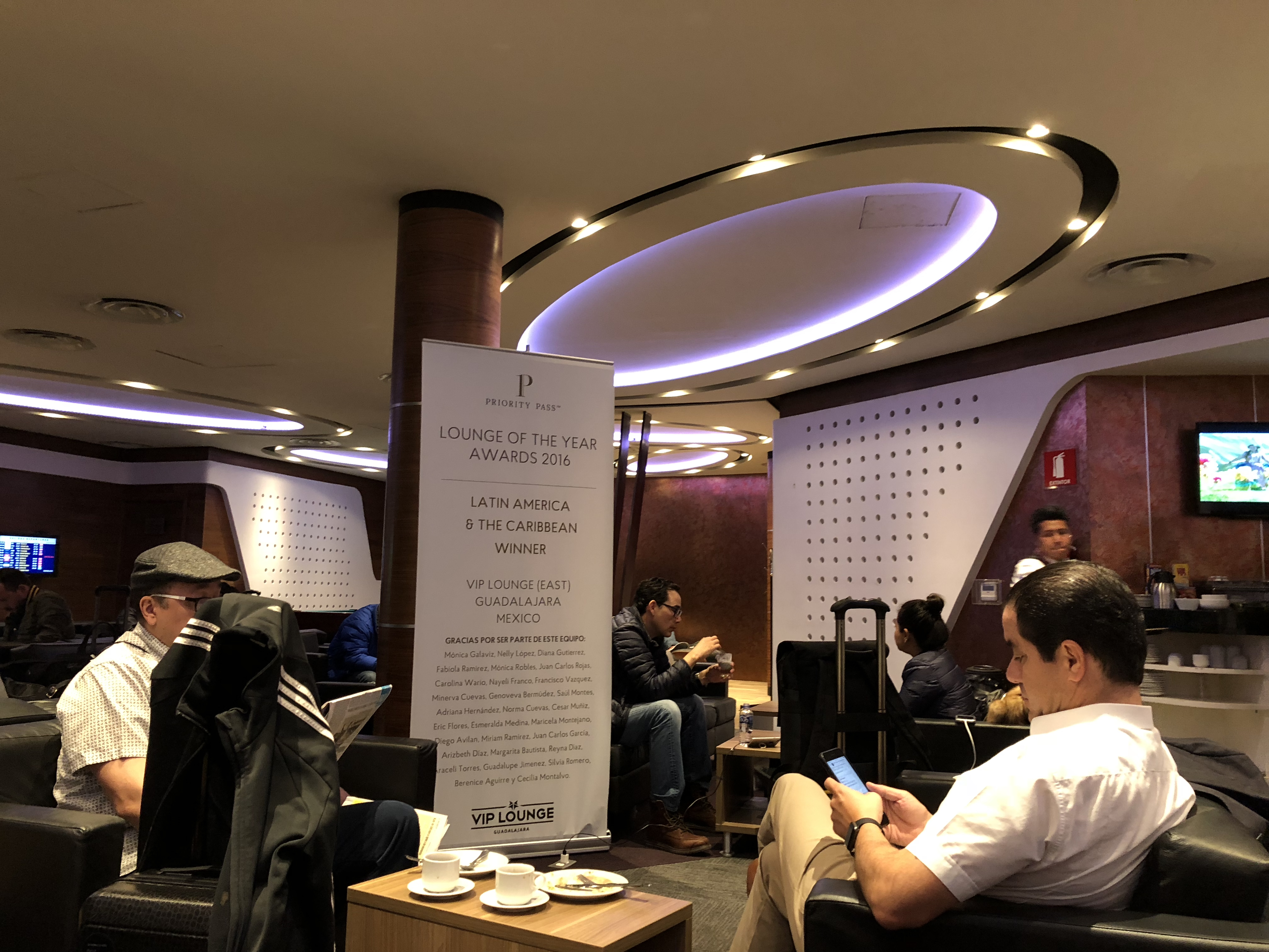 VIP Lounge (este) en el Aeropuerto Internacional de Guadalajara.